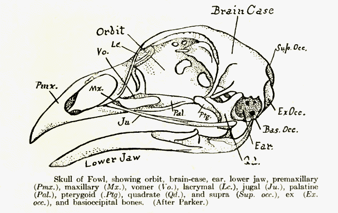 Bird skull